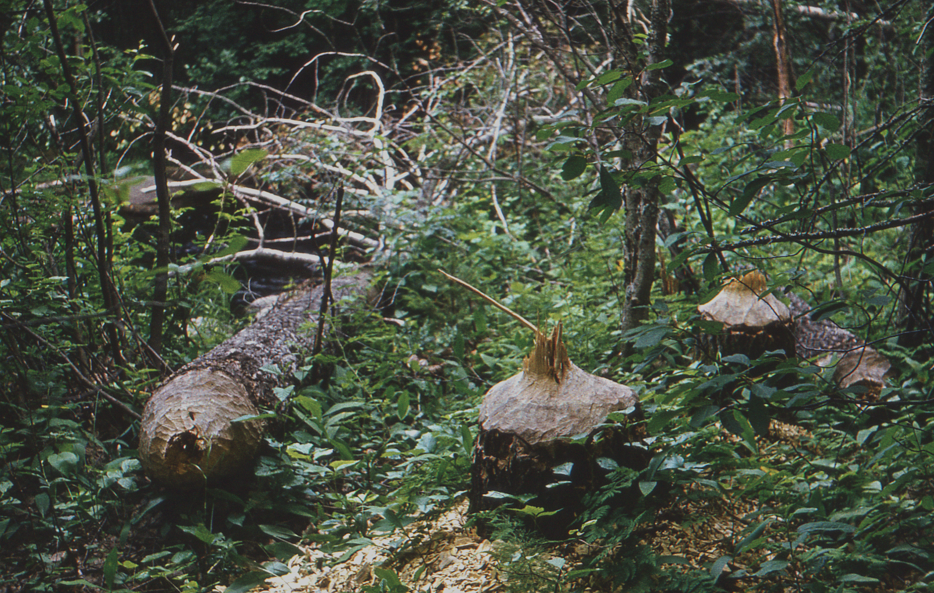 Следы работы бобров.Карелия.